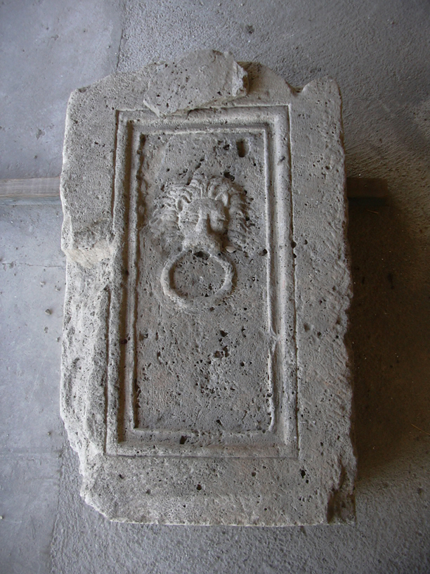 Sírkő Contra-Aquincumból, az Erzsébet-híd alapozásakor került elő 1898-ban